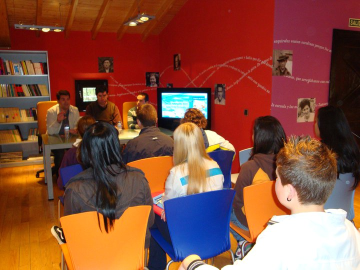 Presentación del llibru "Pelegrinos del abismu" de Lluis Portal